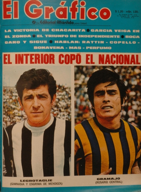 Víctor Legrotaglie y Roberto Gramajo en edición N° 2664 de la Revista El Gráfico.